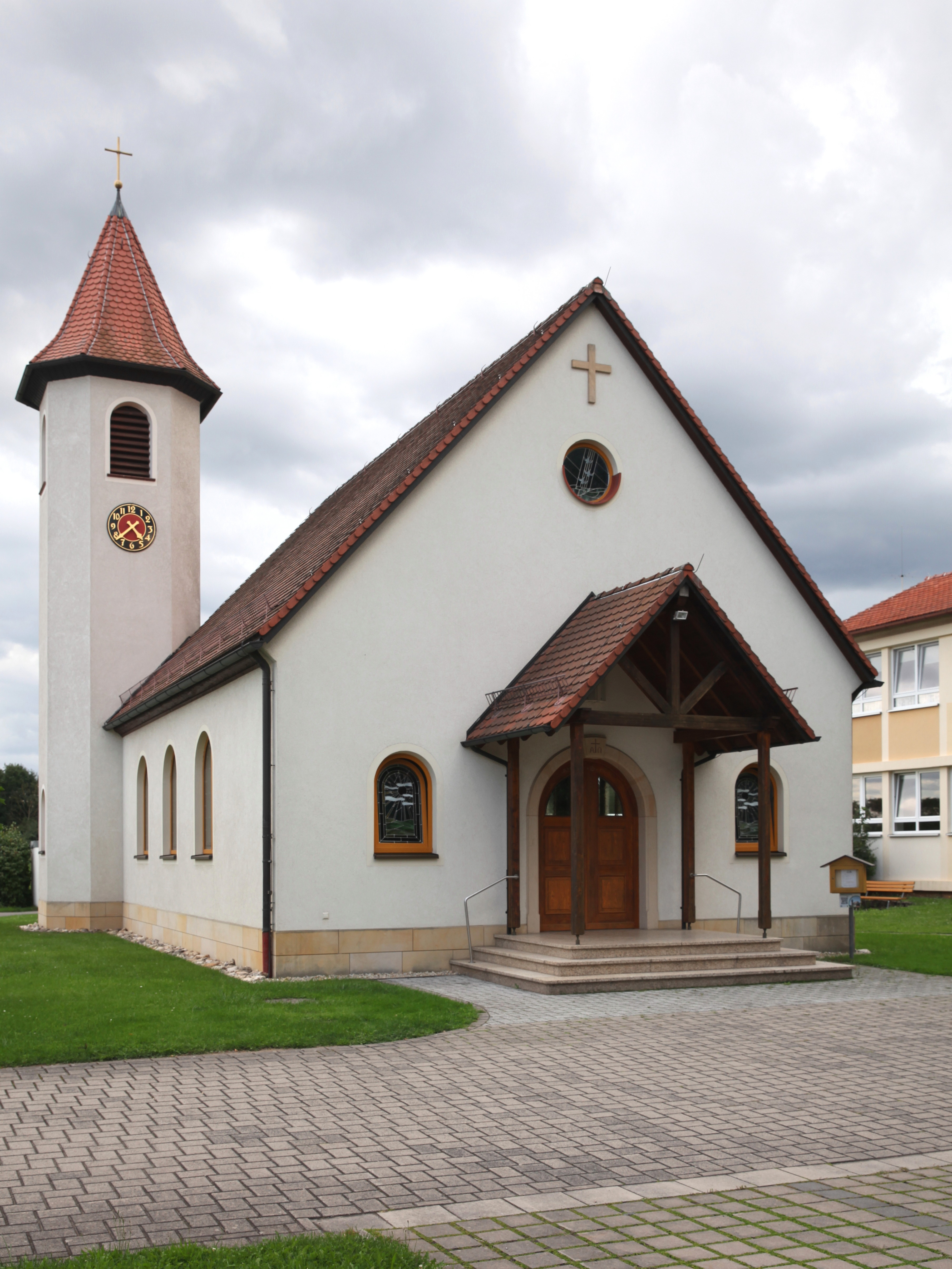 Christuskirche in Unterlangenstadt